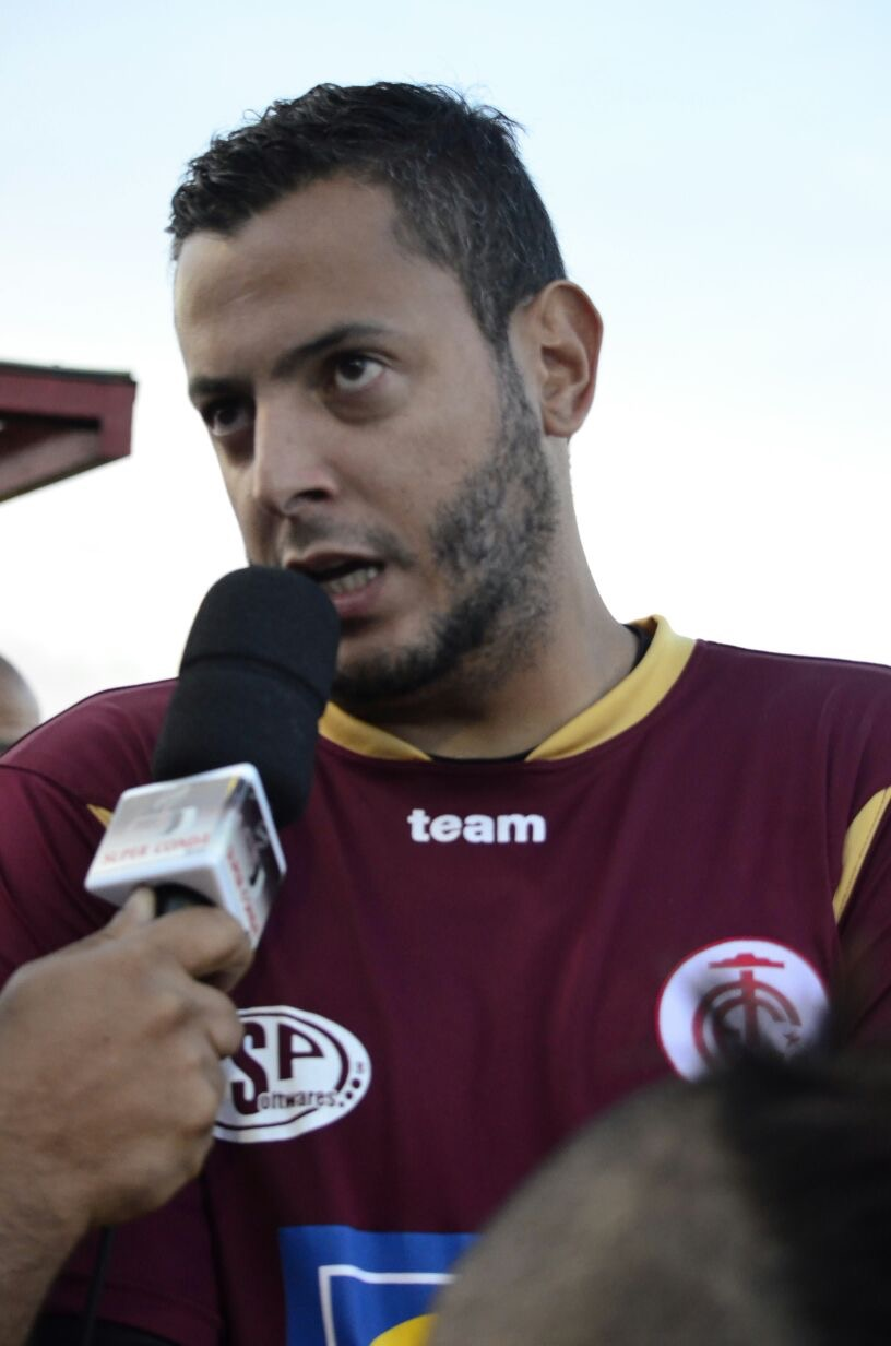 Fernando Henrique à época do Inter de Lages